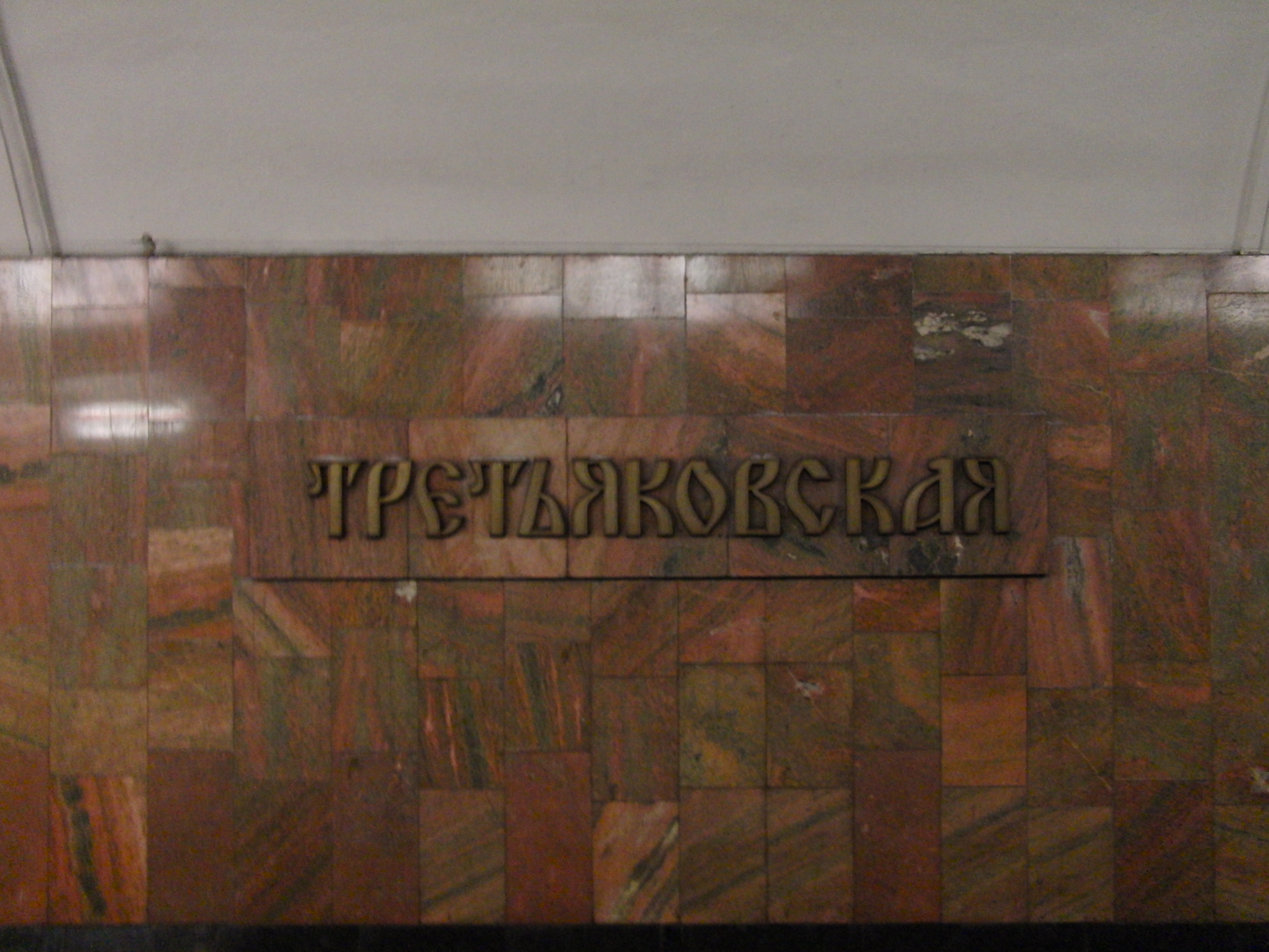 Tretyakovskaya (Третьяковская)